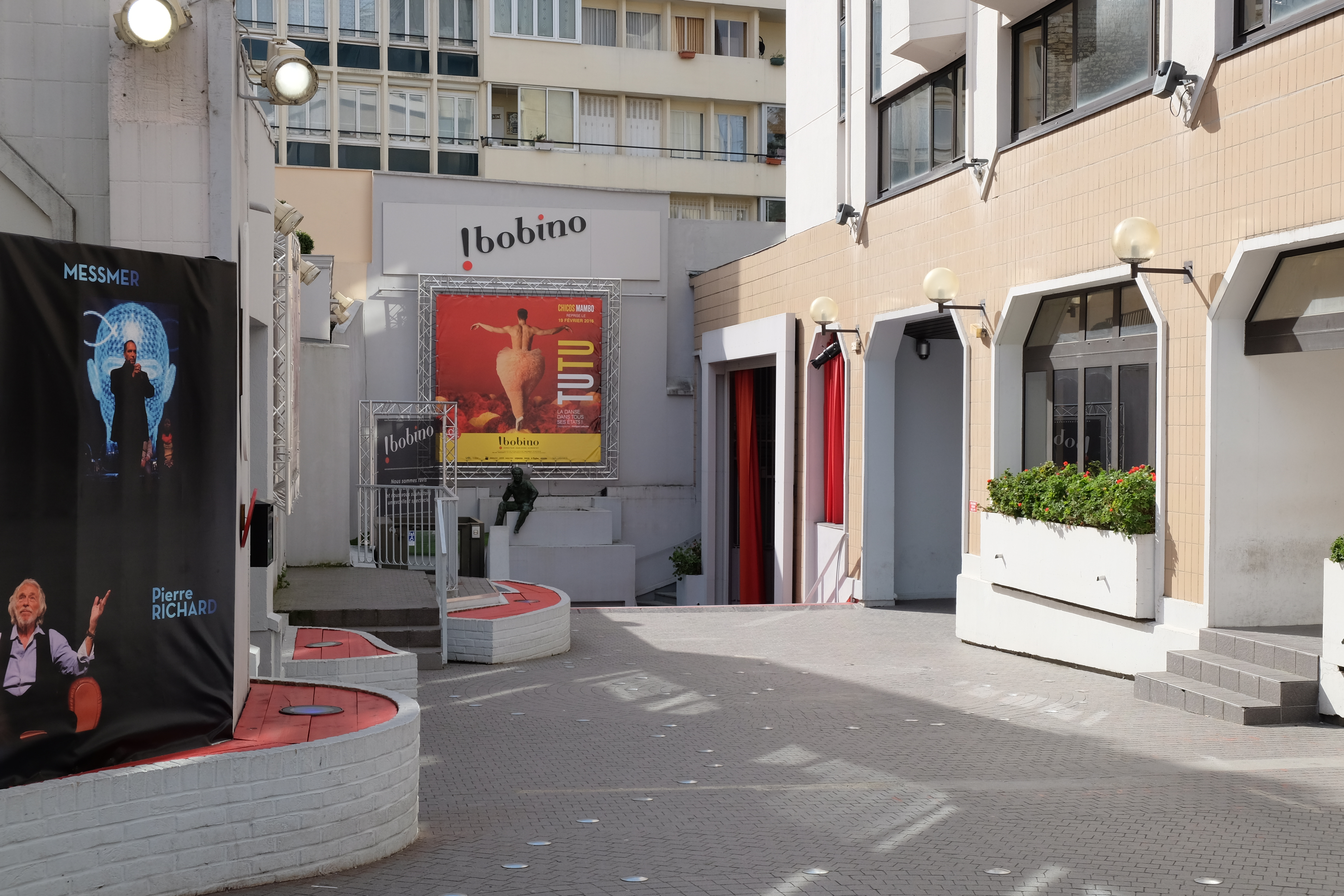 Entrée du Théâtre Bobino, rue de la Gaîté, Paris XIV